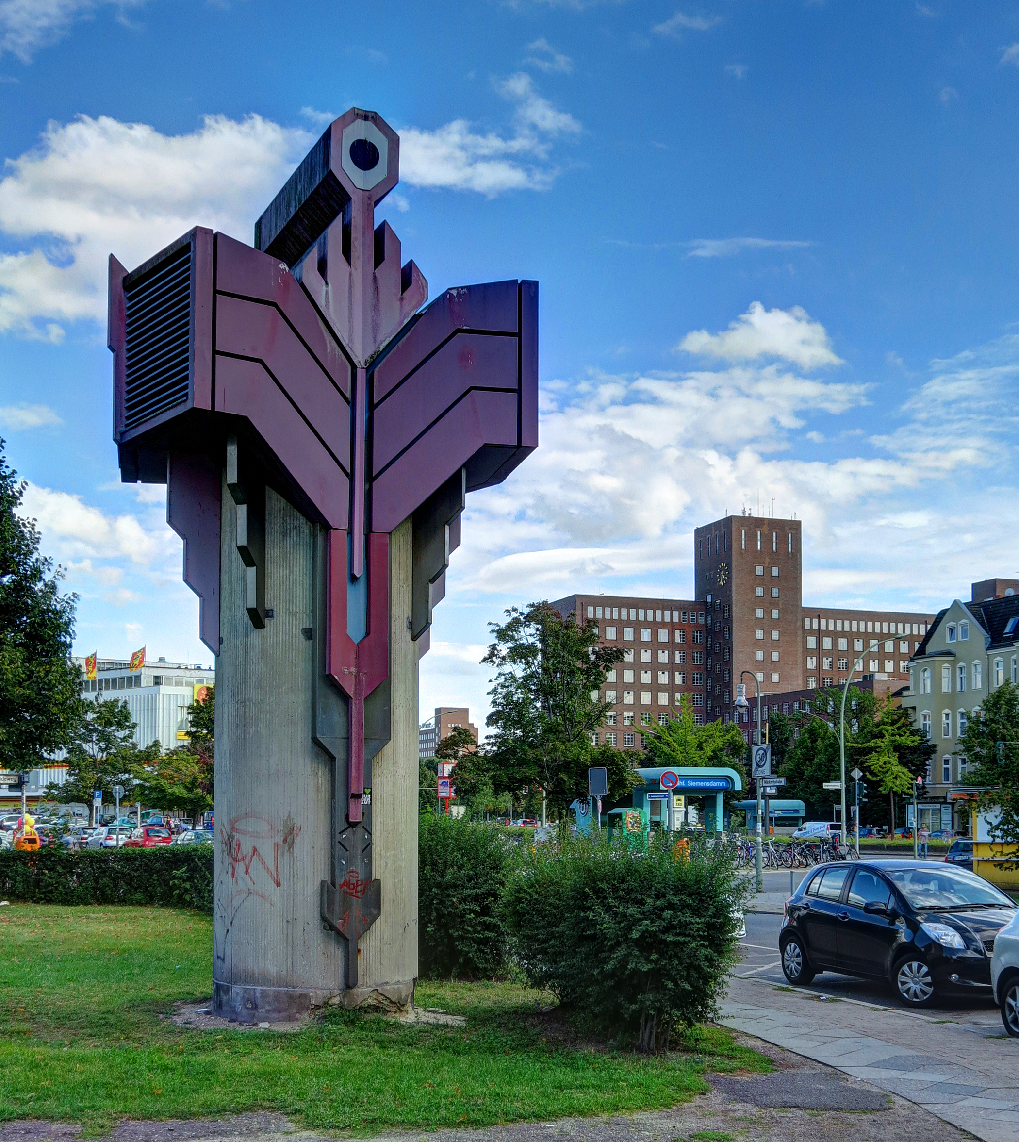 U-Bahnhof Siemensdamm - Westlicher Luftfilterturm, im Hintergrund das Wernerwerk-Hochhaus